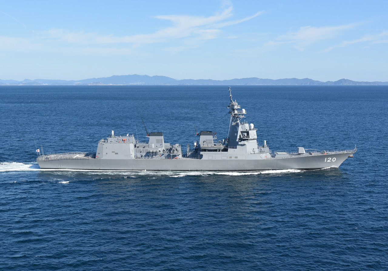 護衛艦「しらぬい」